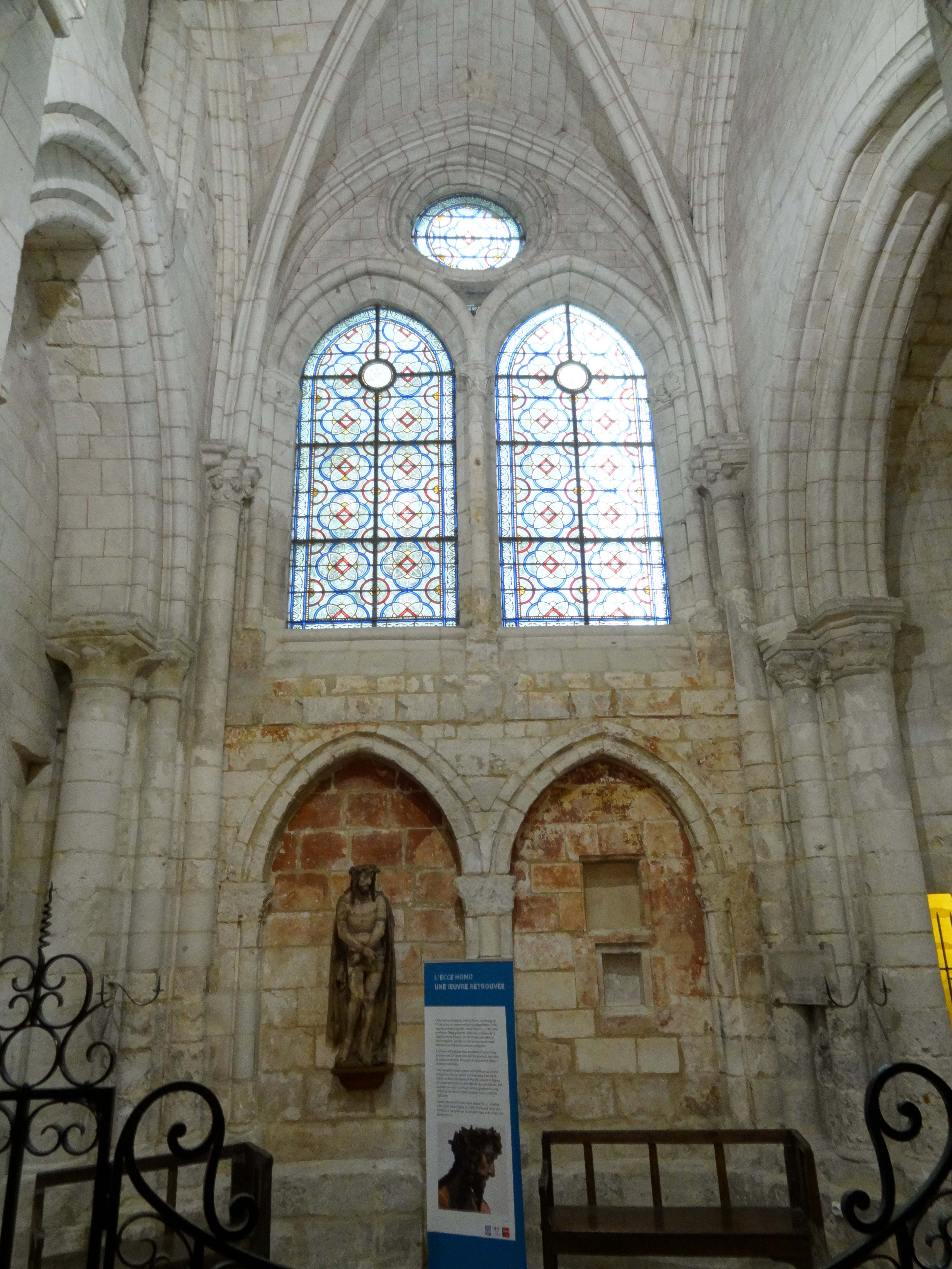 Intérieur de l'église - voir titre.